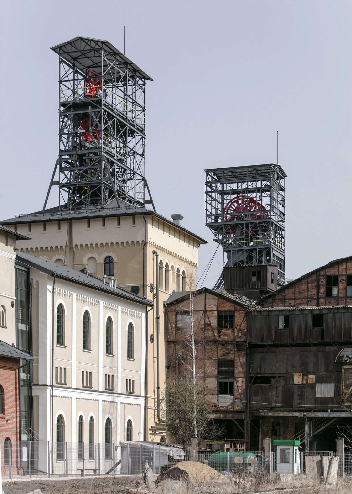 KWK Julia Förderschächte mit Malakowtürmen